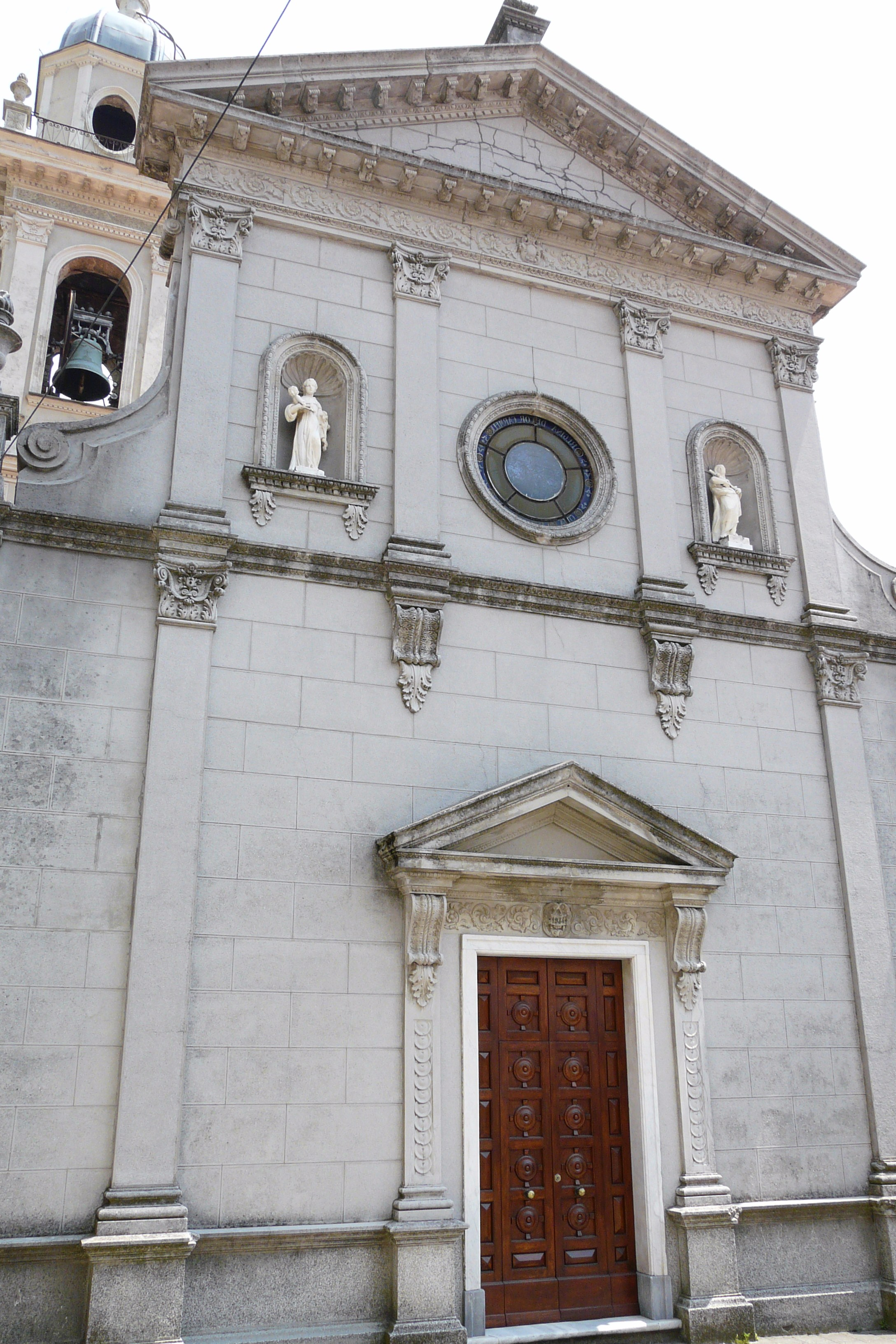 Chiesa di San Bartolomeo, Maissana, Liguria, Italia